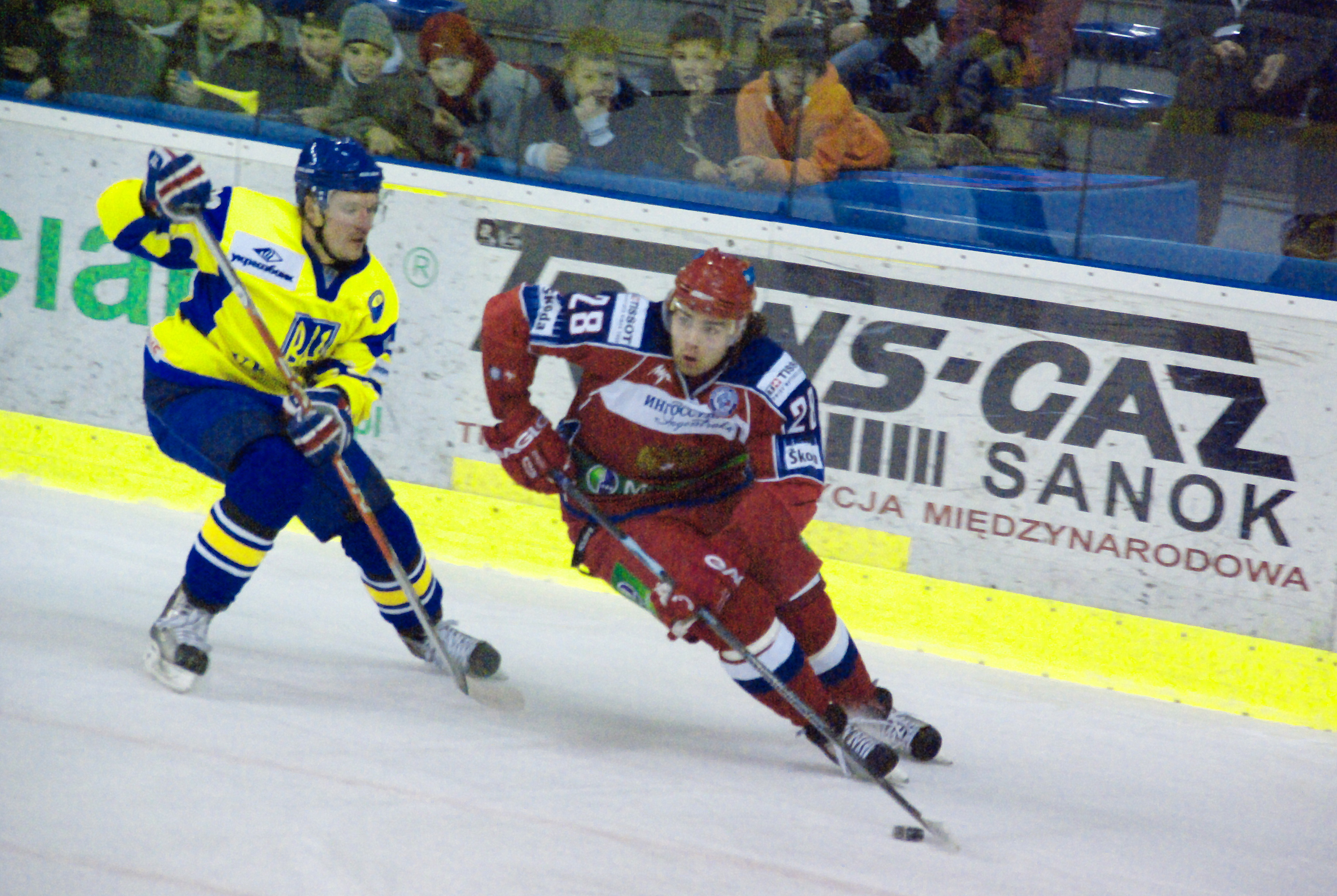 Aleksandr Kalyanin podczas meczu Rosja B - Ukraina (turniej EIHC w Sanoku)